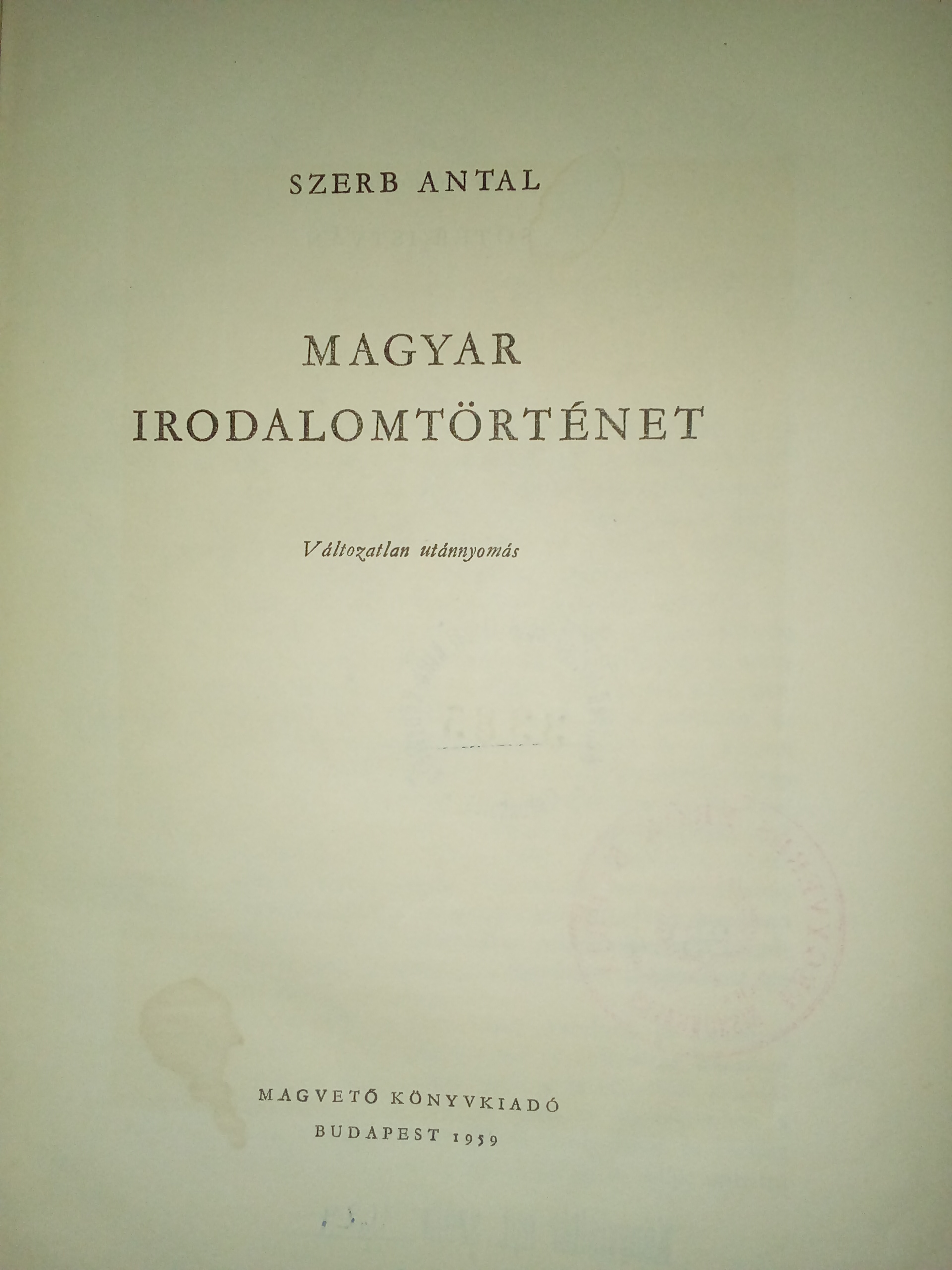 Az adott mű címlapja.